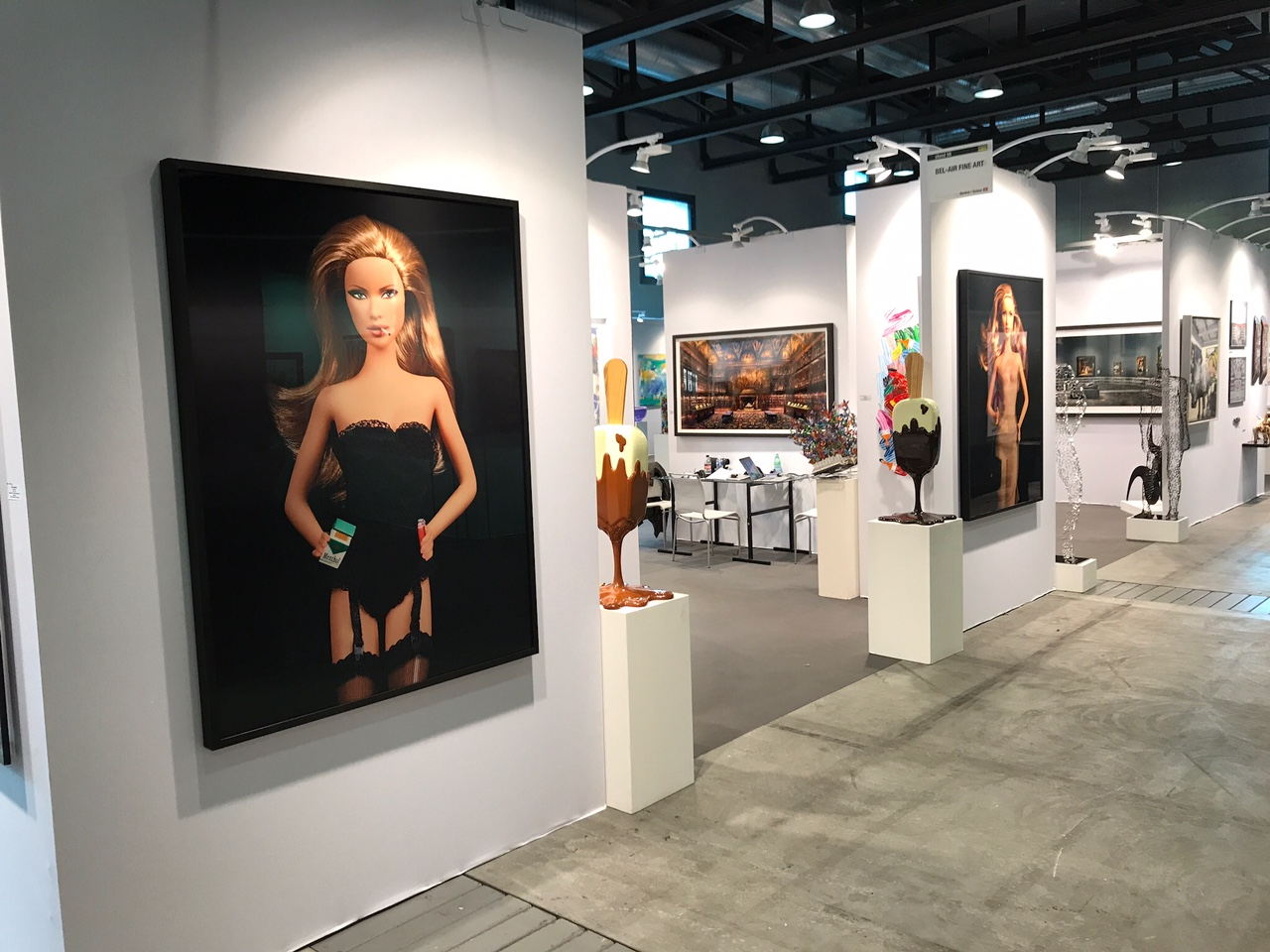 photos Smoking Burqa et Golden Girl